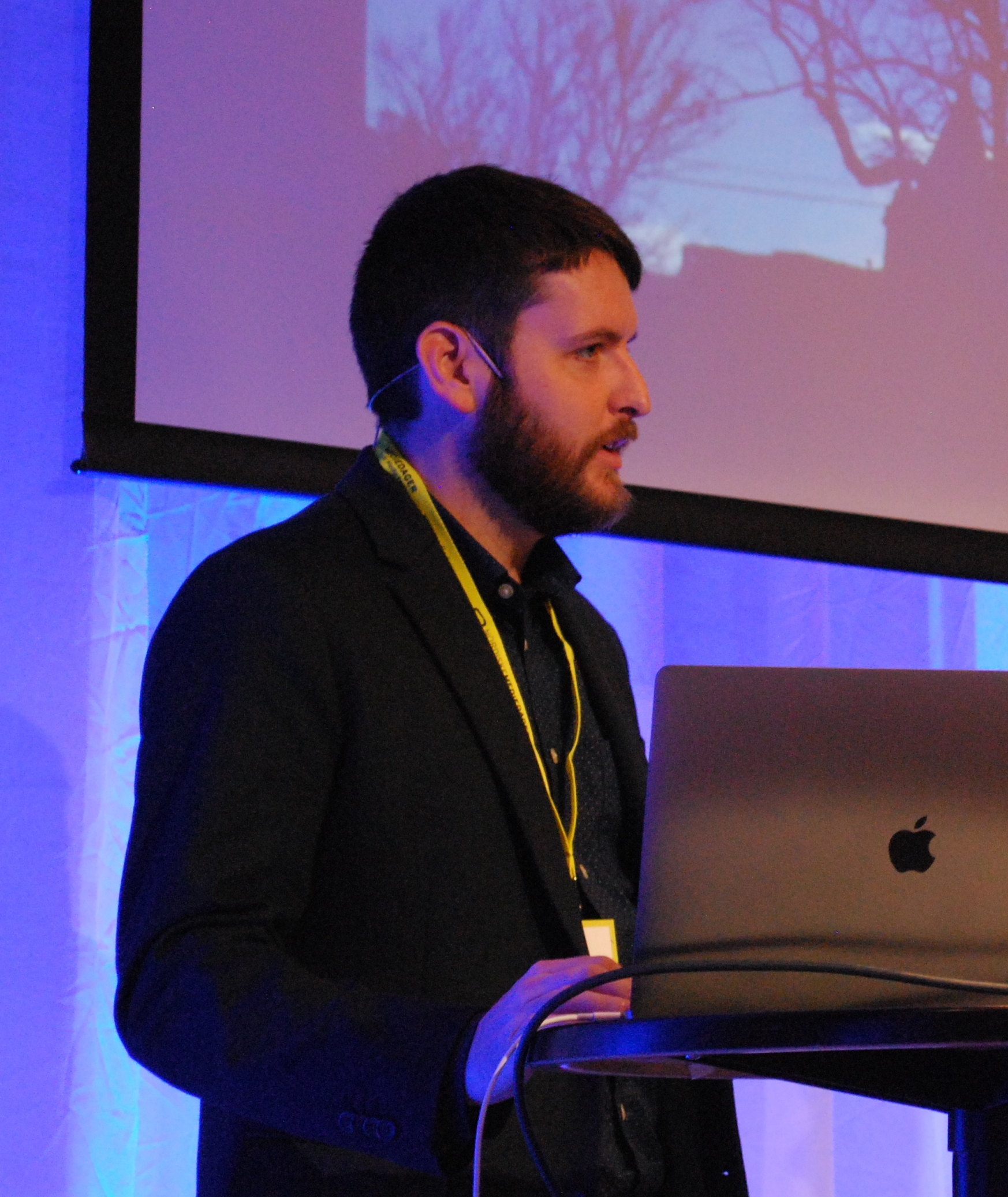 Ryan Kelly